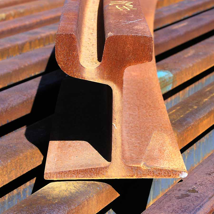 Coupe d’un rail à gorge typiquement utilisé sur des réseaux de tramways lorsque la voie doit être encastrée dans la chaussée. Photo prise à Toronto, sur un chantier auxiliaire de modernisation de la boucle de la station St-Clair.